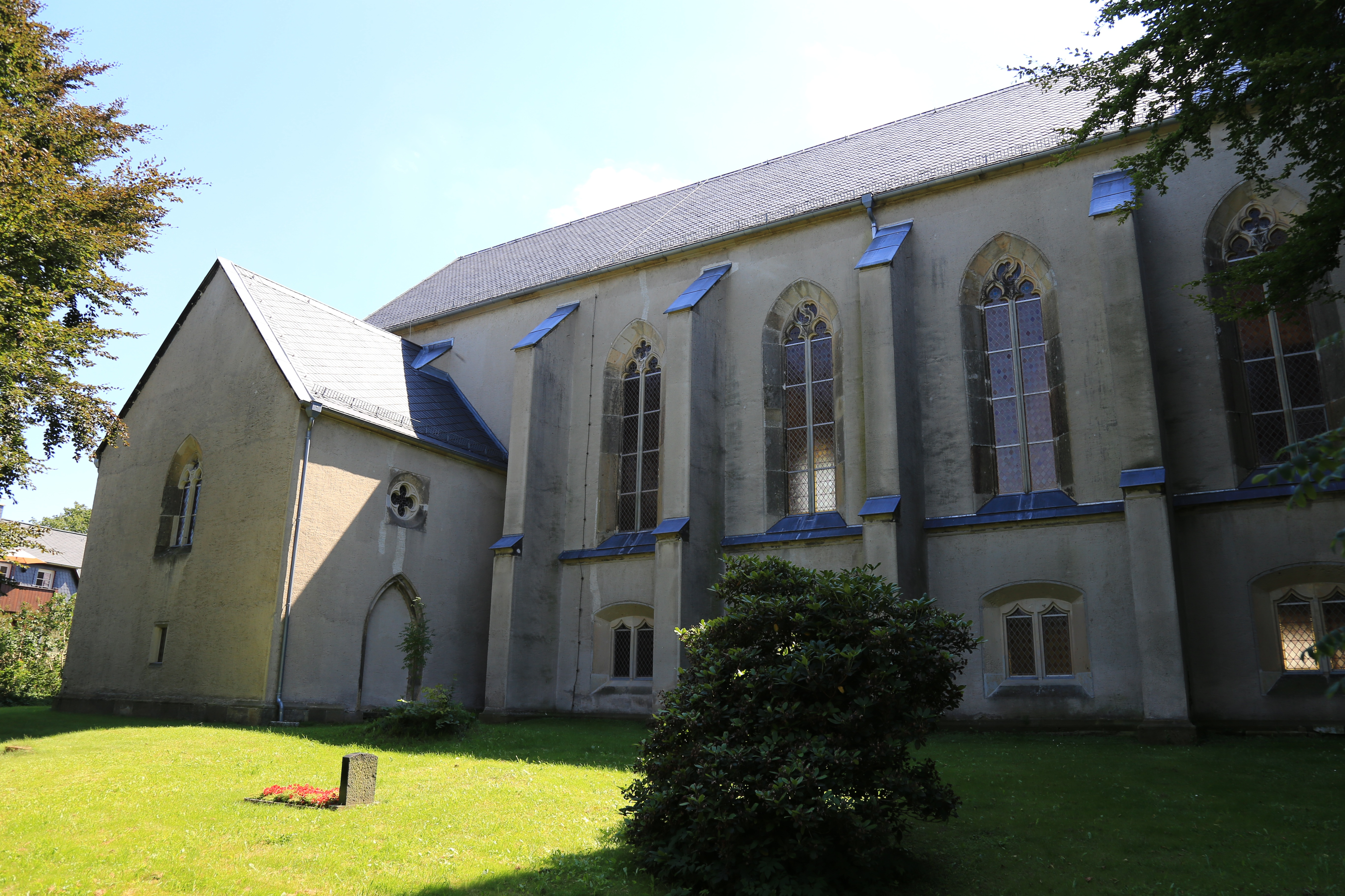 Kirche Wantewitz August 2017 (5)